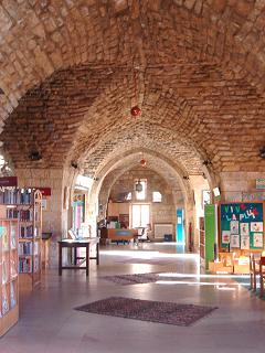 la médiathèque du centre culturel français, dans l'ancien palais de Fakhreddine II, Deir el-Qamar